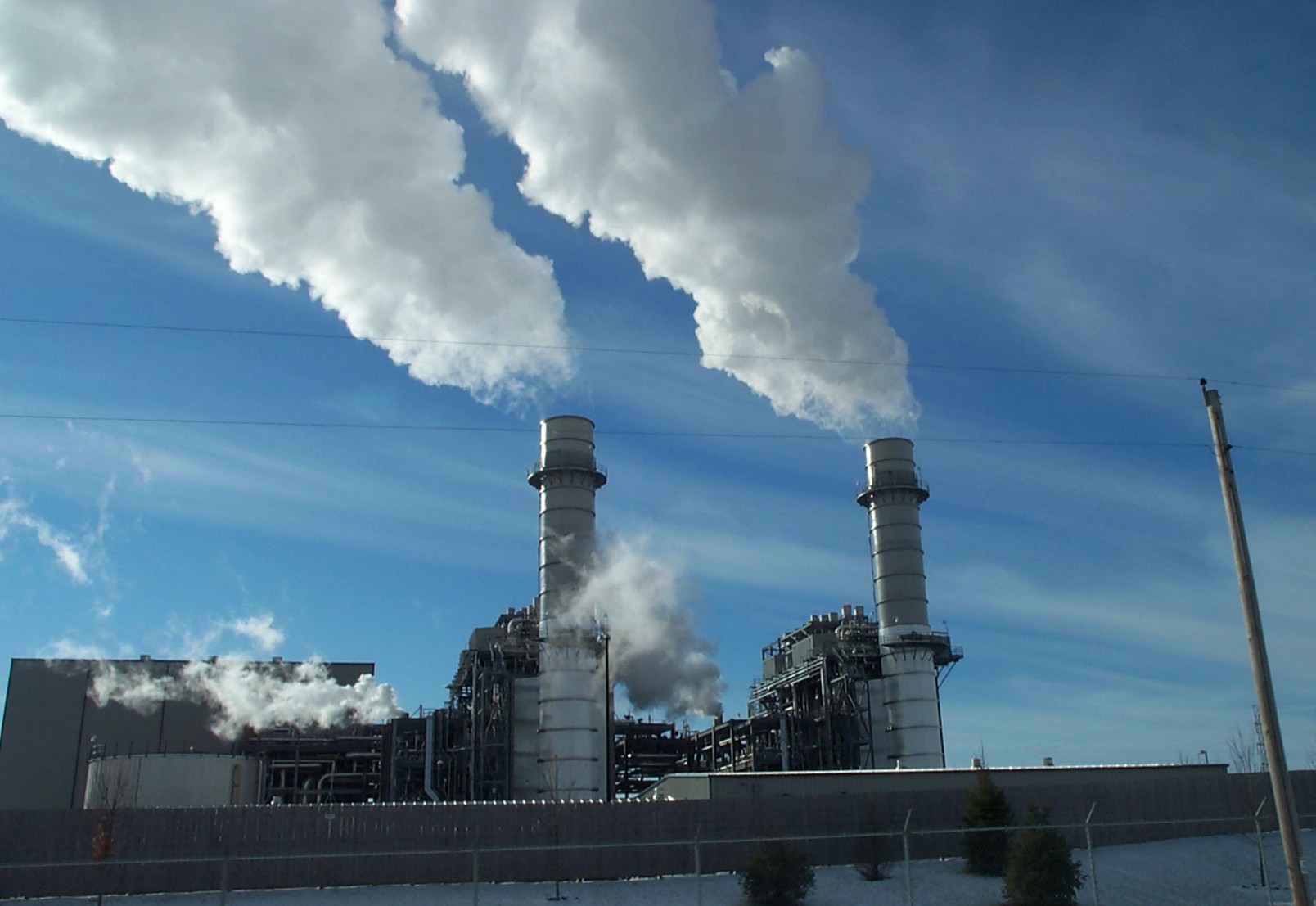 Riverside Energy Center